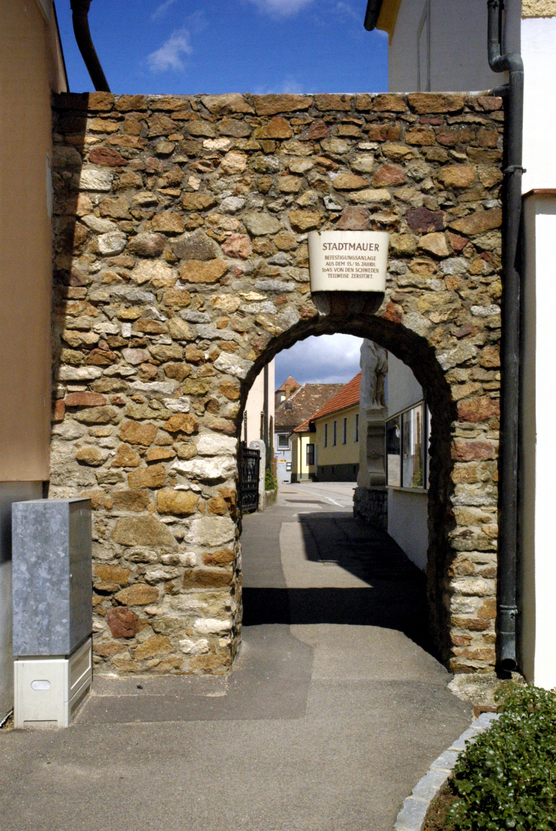 Reste der Stadtmauer von Maissau aus dem 15./16. Jhd., 1645 von den Schweden teilweise zerstört.